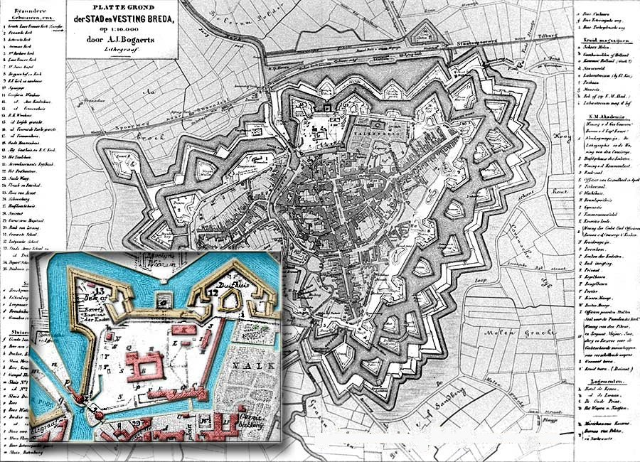 Plattegrond der stad en Vesting Breda op 1:10.000 door A.J. Bogaerts. Collectie Koninklijke Militaire Academie Breda. Eigen fotocollectie en digitale bewerking Ed Stevenhagen.